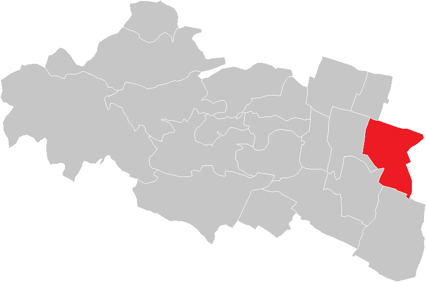 Bezirk Mödling